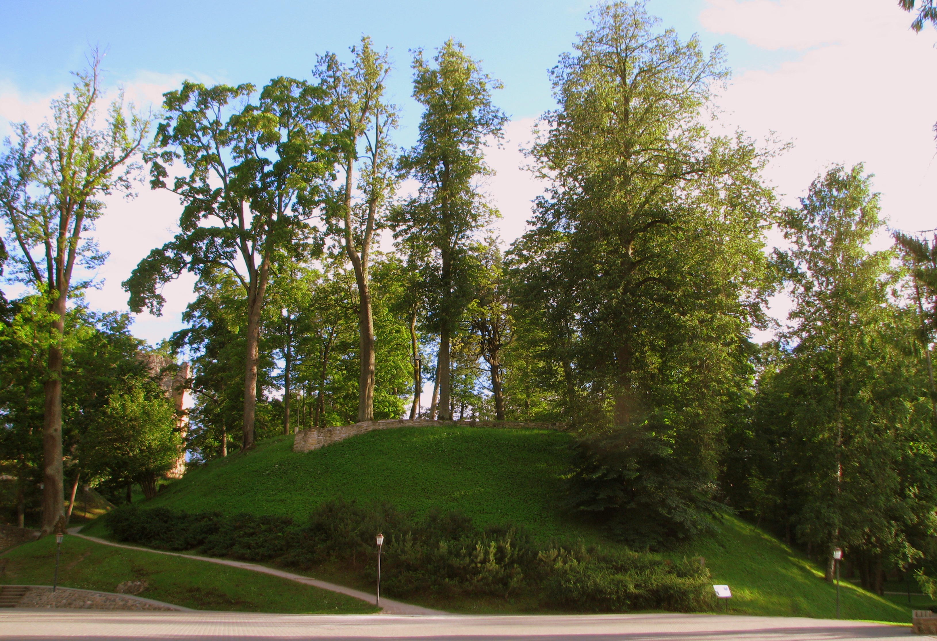 Riekstu kalns - pilskalns, Cēsis